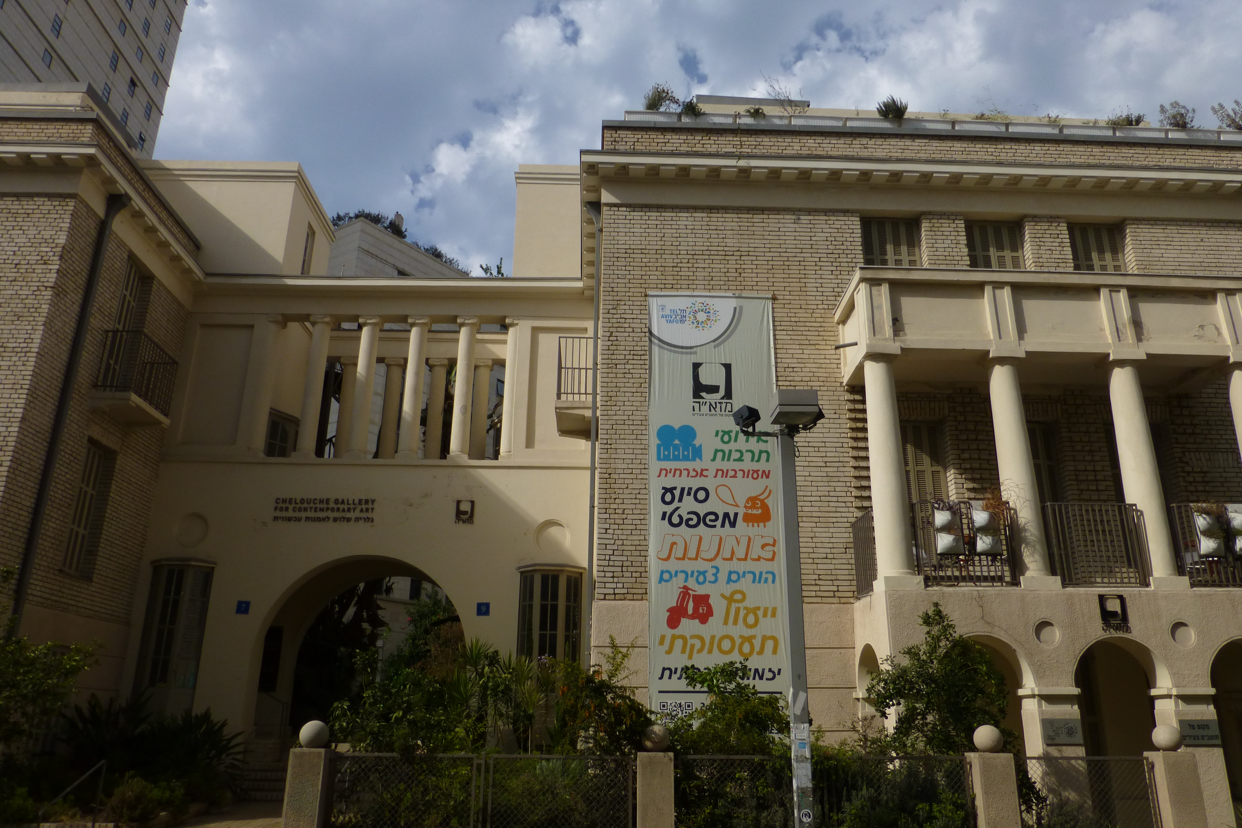 בית ברלין פסובסקי או בית התאומים הוא מבנה ידוע בתל אביב הבנוי בסגנון האקלקטי. הקמת הבניין הושלמה בשנת 1922 כמבנה חד-קומתי. בשנת 1925 נוספו לבניין שתי קומות נוספות, וכן חדרים על הגג, והוא קיבל את צורתו הנוכחית כבית תאומים סימטרי שקשת מונומנטלית מחברת בין שני אגפיו.